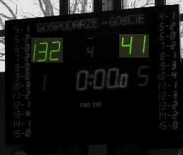 Tablica wyników z wyróżnionym wynikiem punktowym